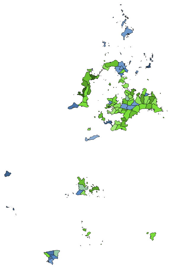 中文（台灣）: 顏色對照表